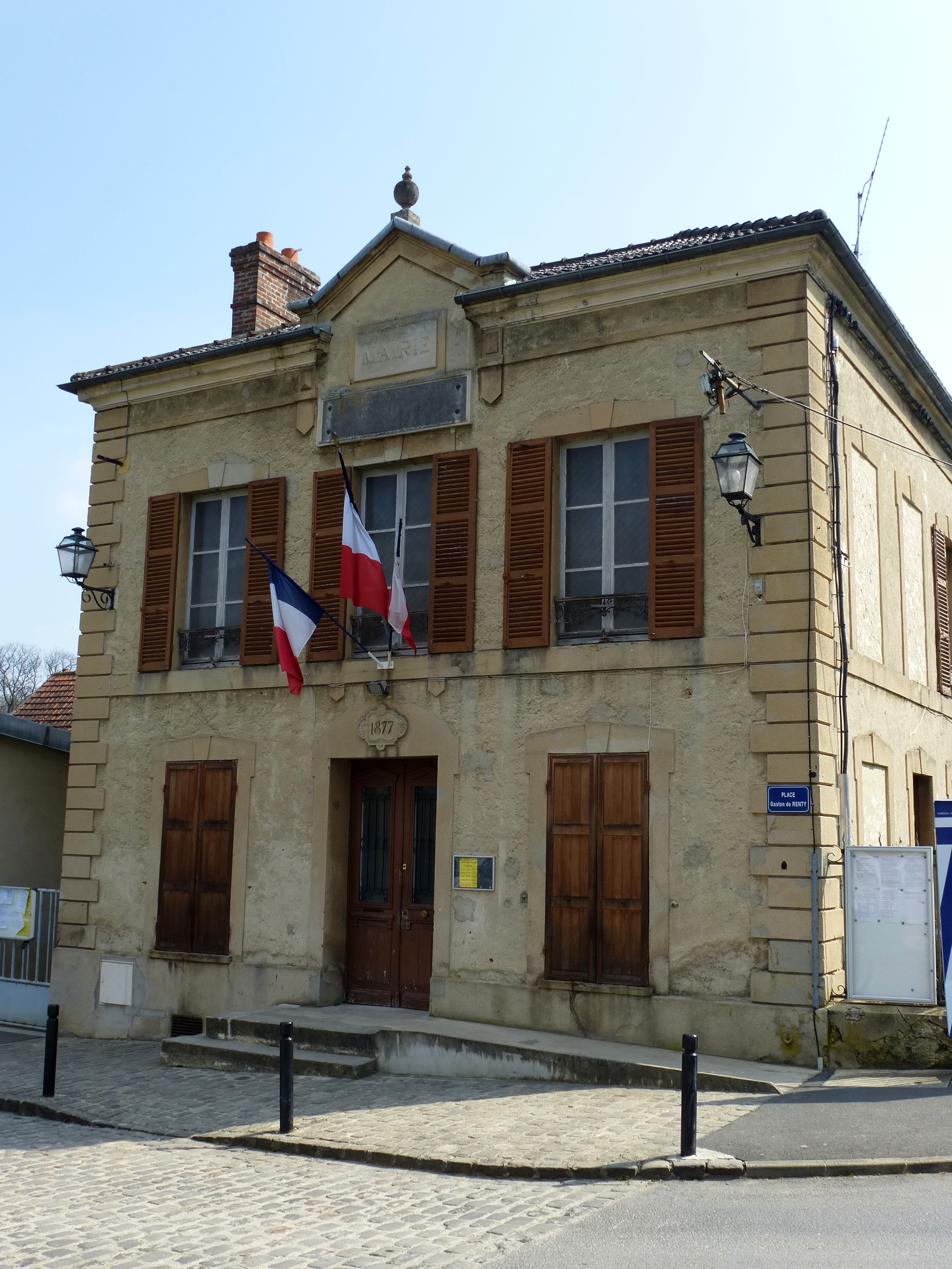 Mairie de Citry. (Seine-et-Marne, région Île-de-France).